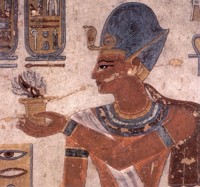 Ramses III. bringt ein Weihrauchopfer dar. Szene aus Eingangsbereich von KV11.